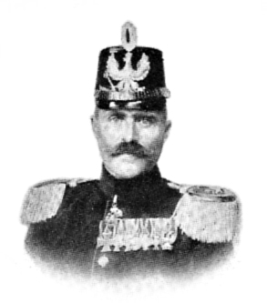 Oberstleutnant Löthar von Trotha